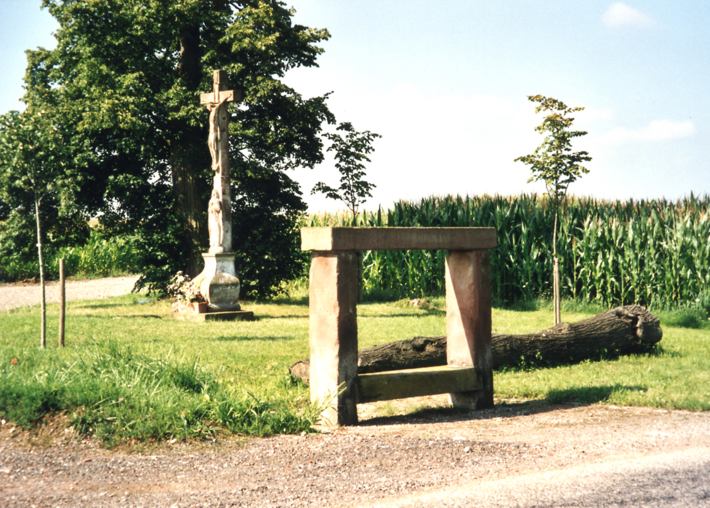 Napoleonsbank im Stil des 2. Empire an der D 286, ca. 300 m westlich von Durrenbach; dahinter ein Magdalenenkreuz von 1817